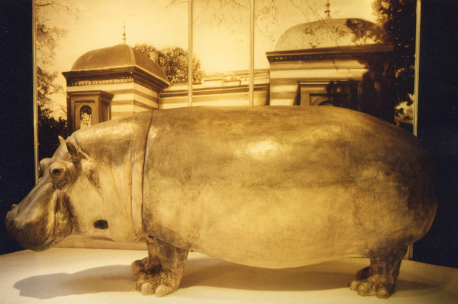 Lebensgroße Skulptur von Knautschke in einer Ausstellung der Stiftung Stadtmuseum Berlin